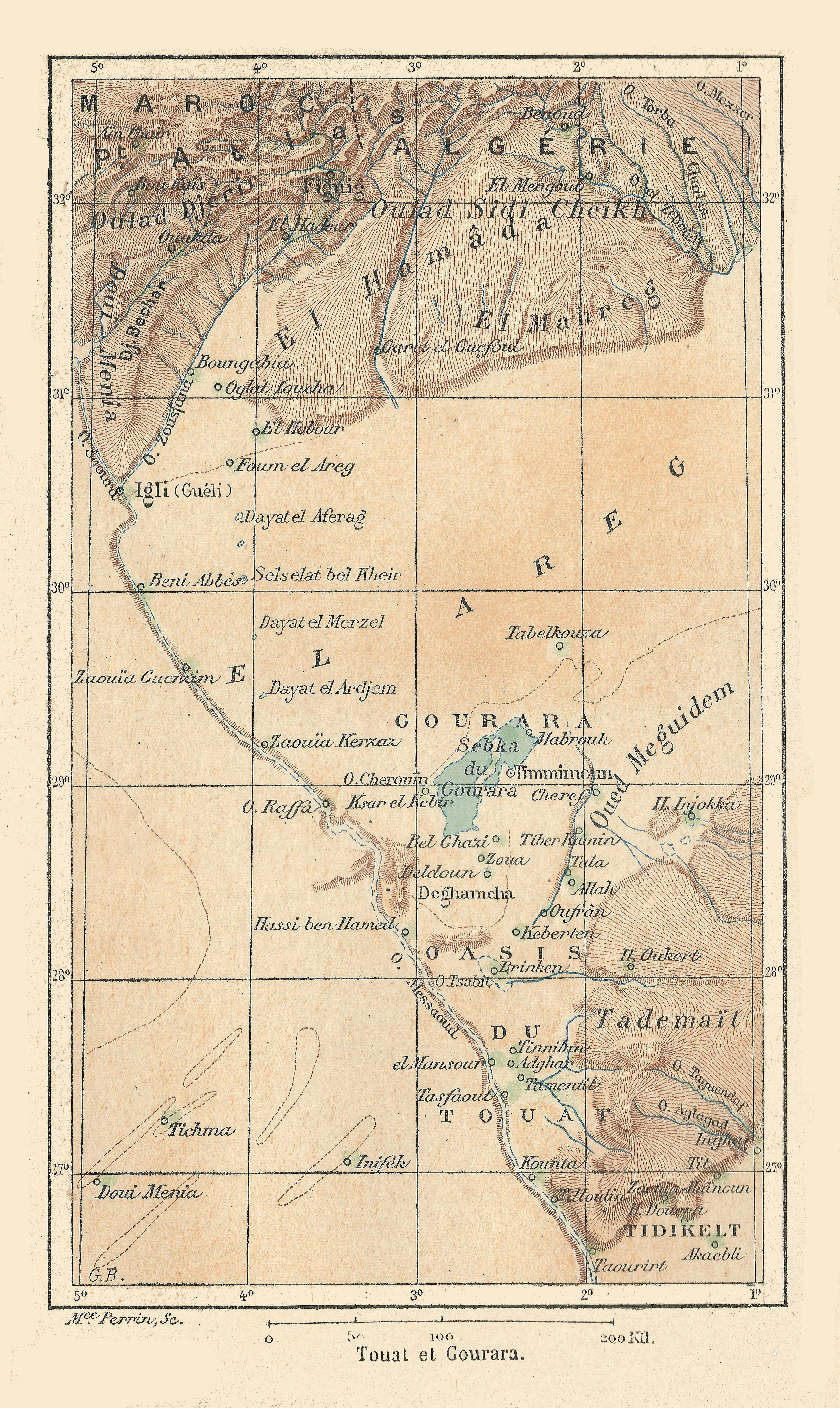 Carte de Franz Schrader